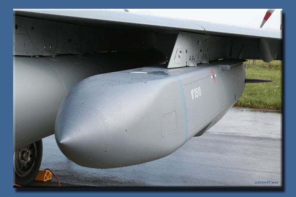 Missile de croisière Apache